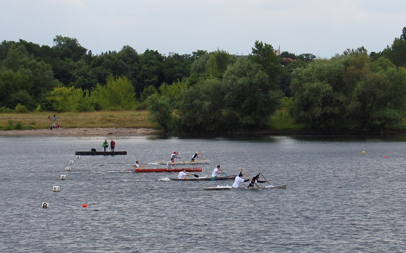 ein Lauf der 13. Betonbootregatta auf dem Salbker See II in Magdeburg-Fermersleben